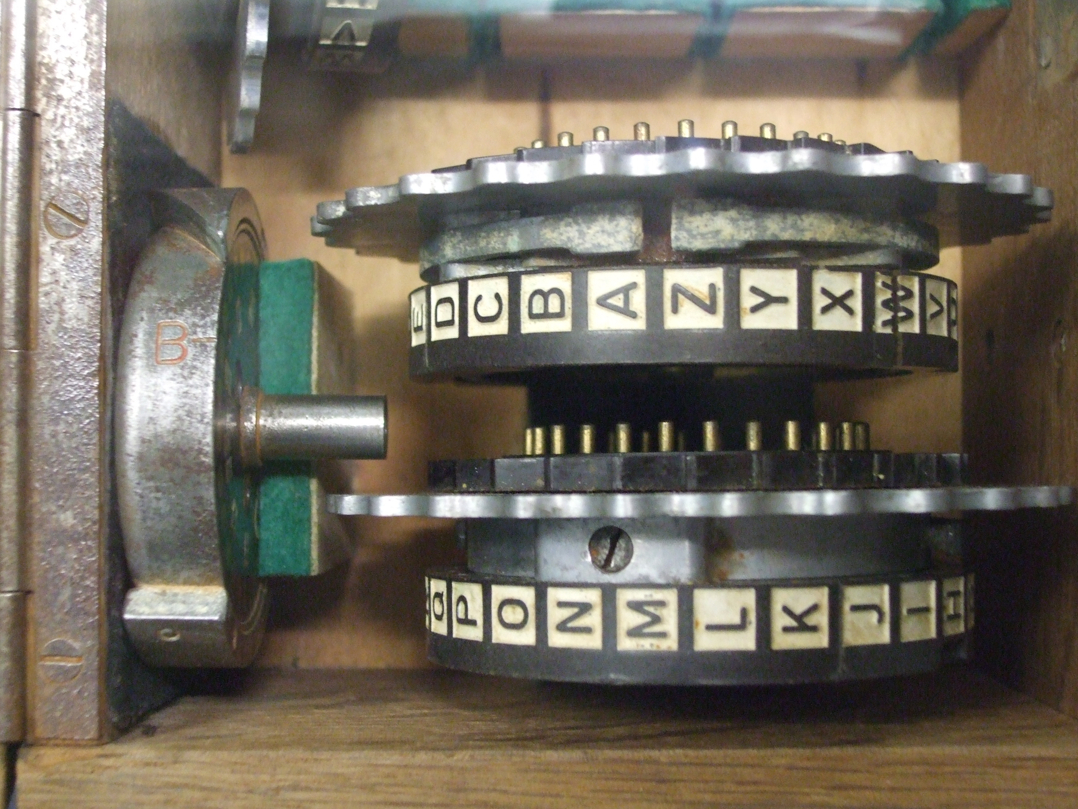 Dünne UKW B sowie einige Walzen der Enigma-M4 im hölzernen Walzenkasten